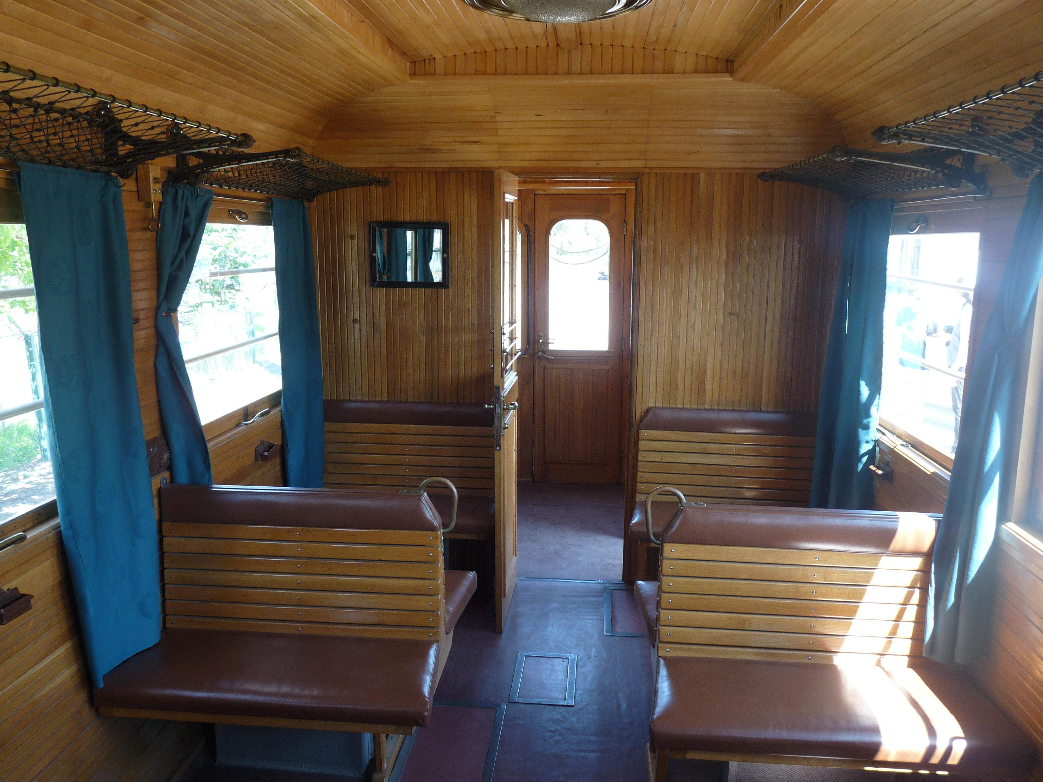 Het interieur van de Groene Pijl. Dit was een regionale tram.